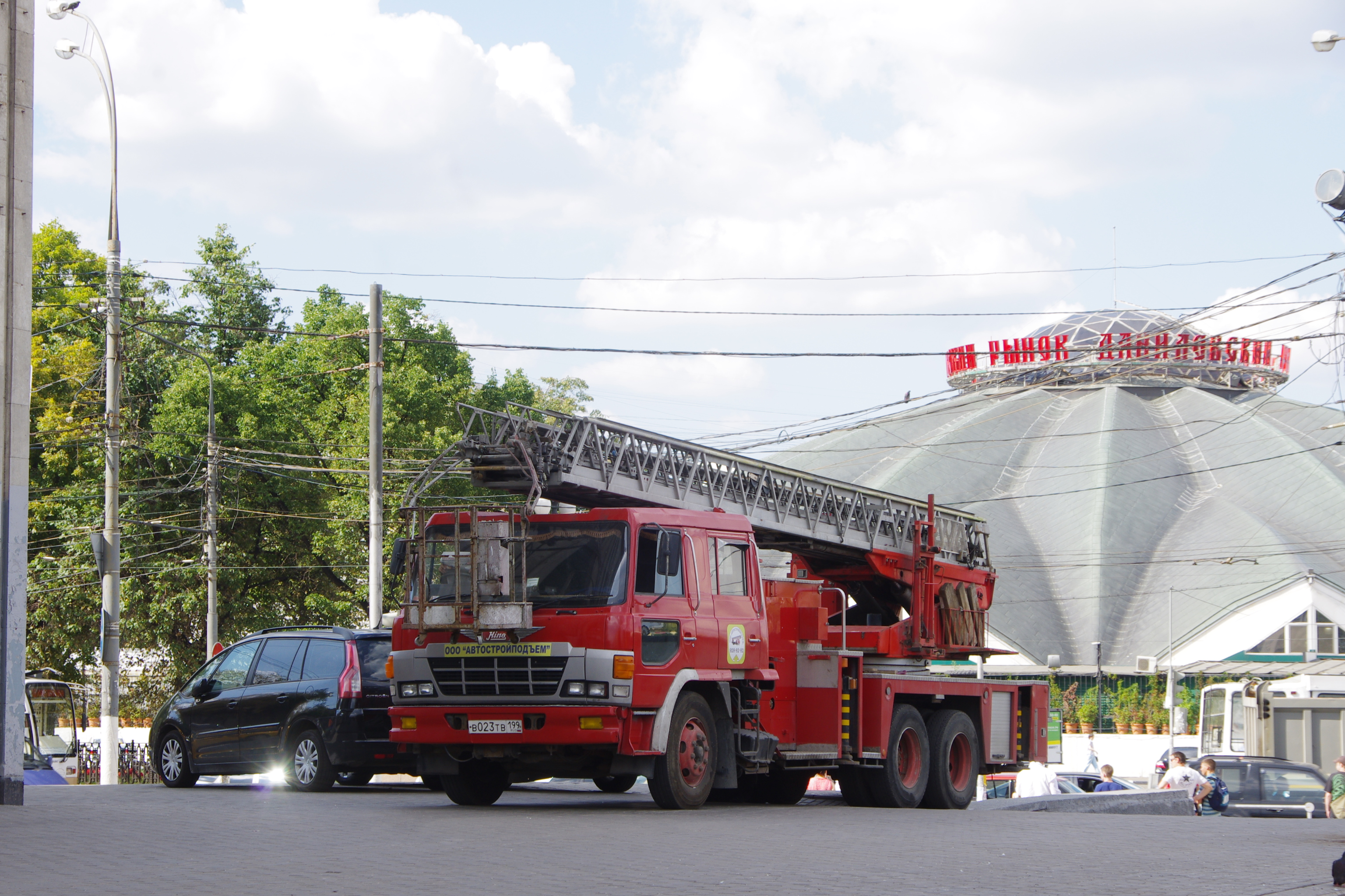 Экскурсия на ЗИЛ